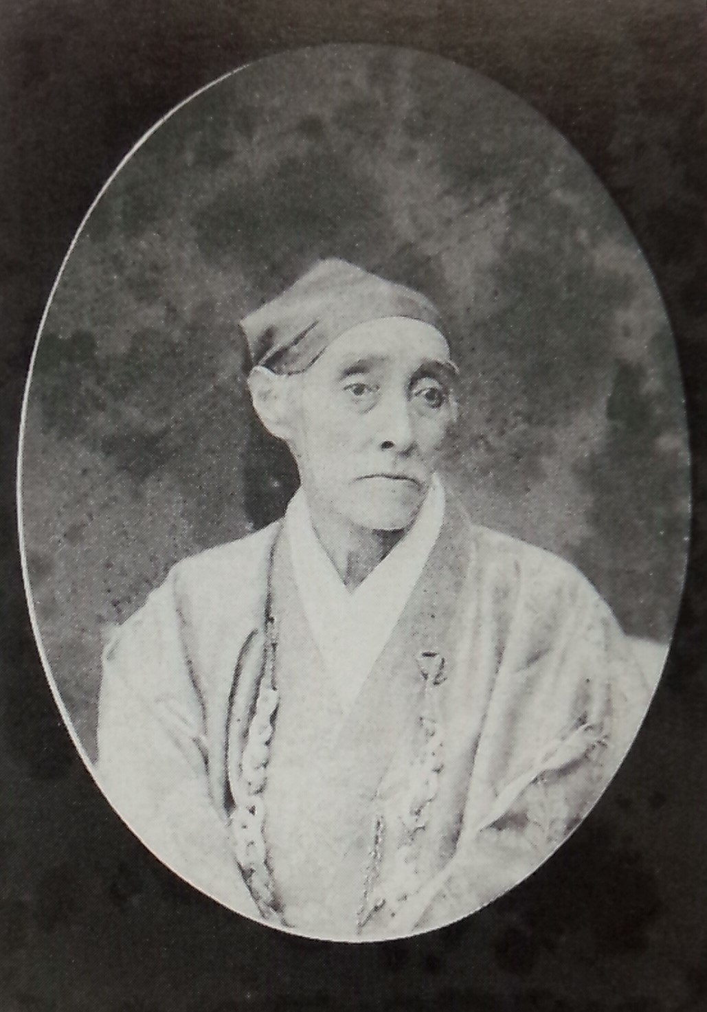 正親町実徳の肖像写真。